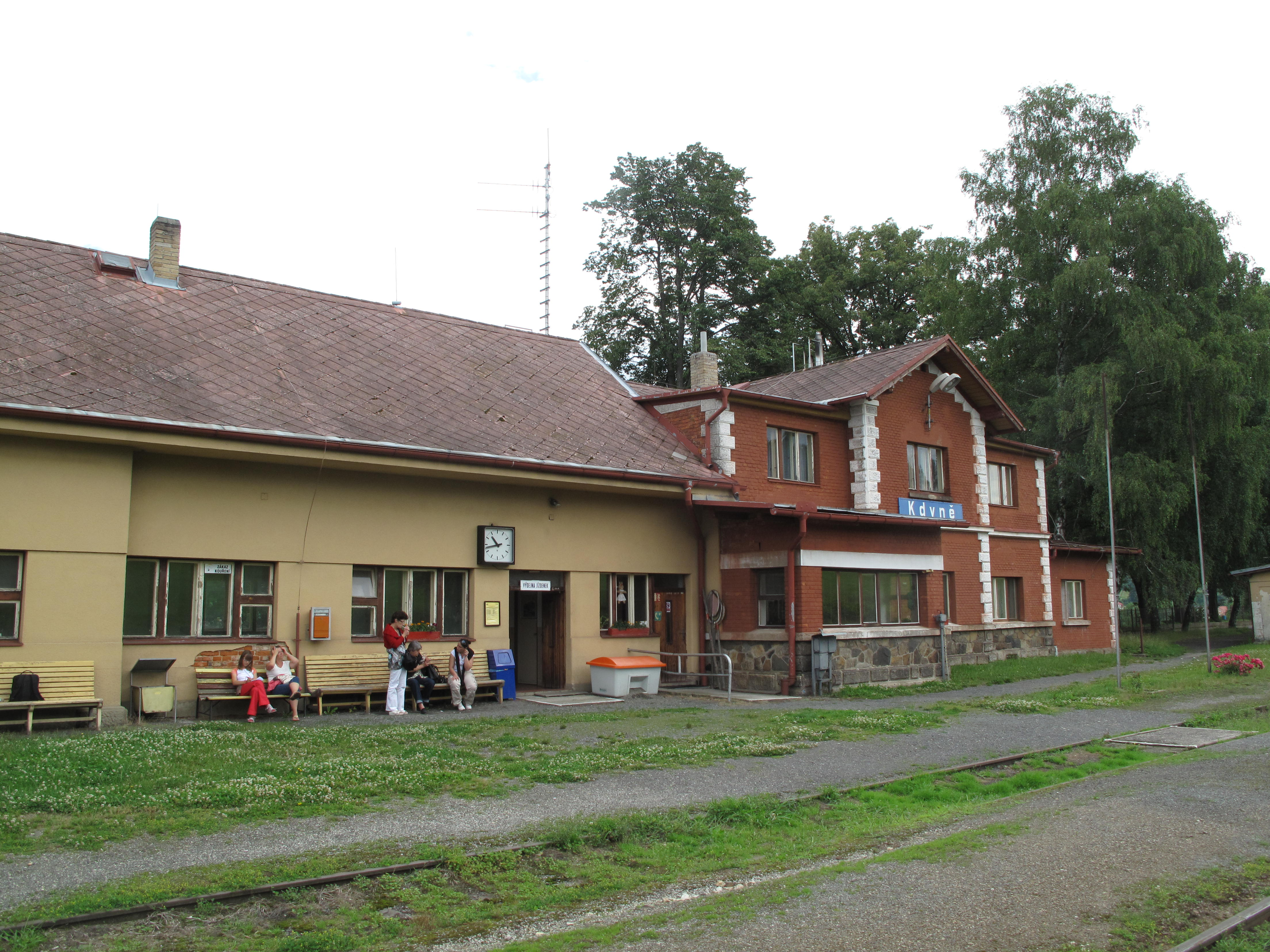 Kdyně, železniční stanice